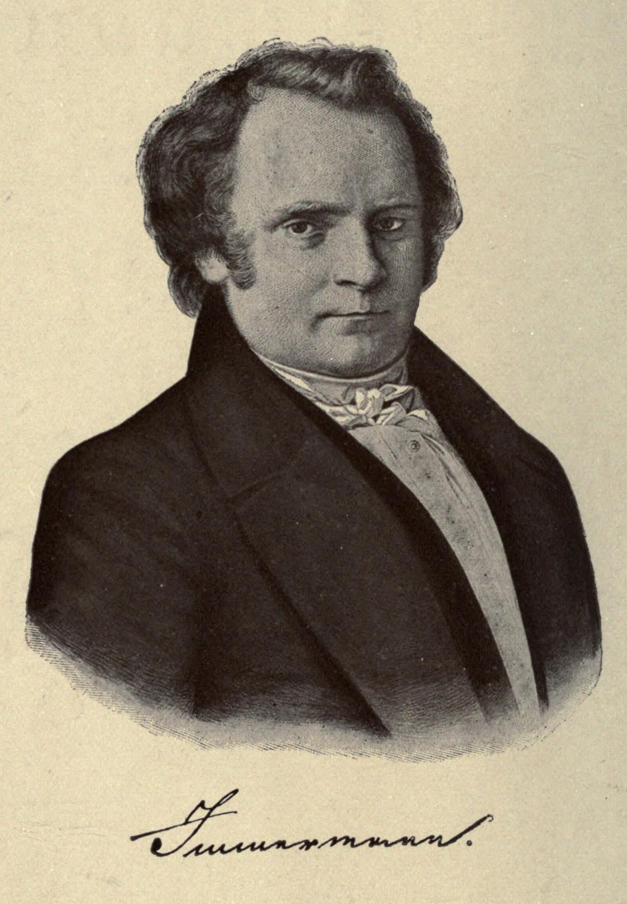 Carl Leberecht Immermann. In: Immermann : der Mann und sein Werk im Rahmen der Zeit- und Literaturgeschichte. München : Beck, 1921